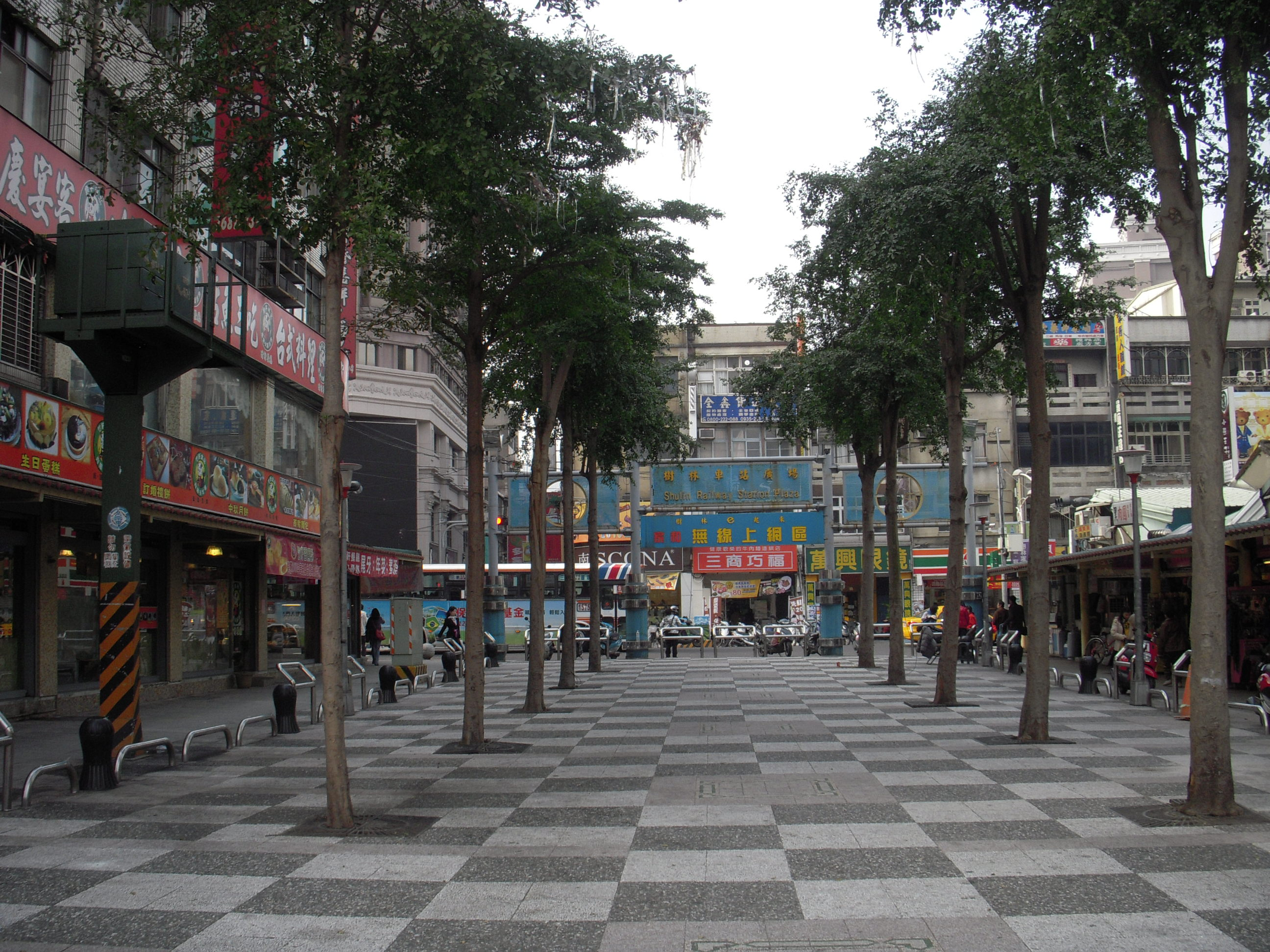 台鐵樹林後車站附近街景